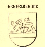 Wappen derer von Rengelrode